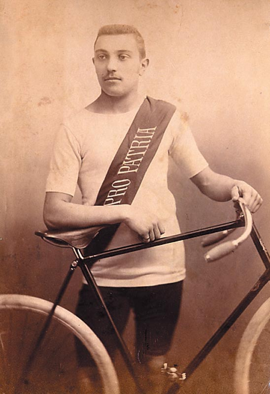 Il ciclista Narciso Pasta - 1890 - in una foto del Museo Storico Pro Patria Milano